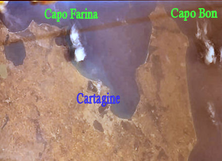 Il golfo di Tunisi (e Cartagine) con i capi Bon e Farina